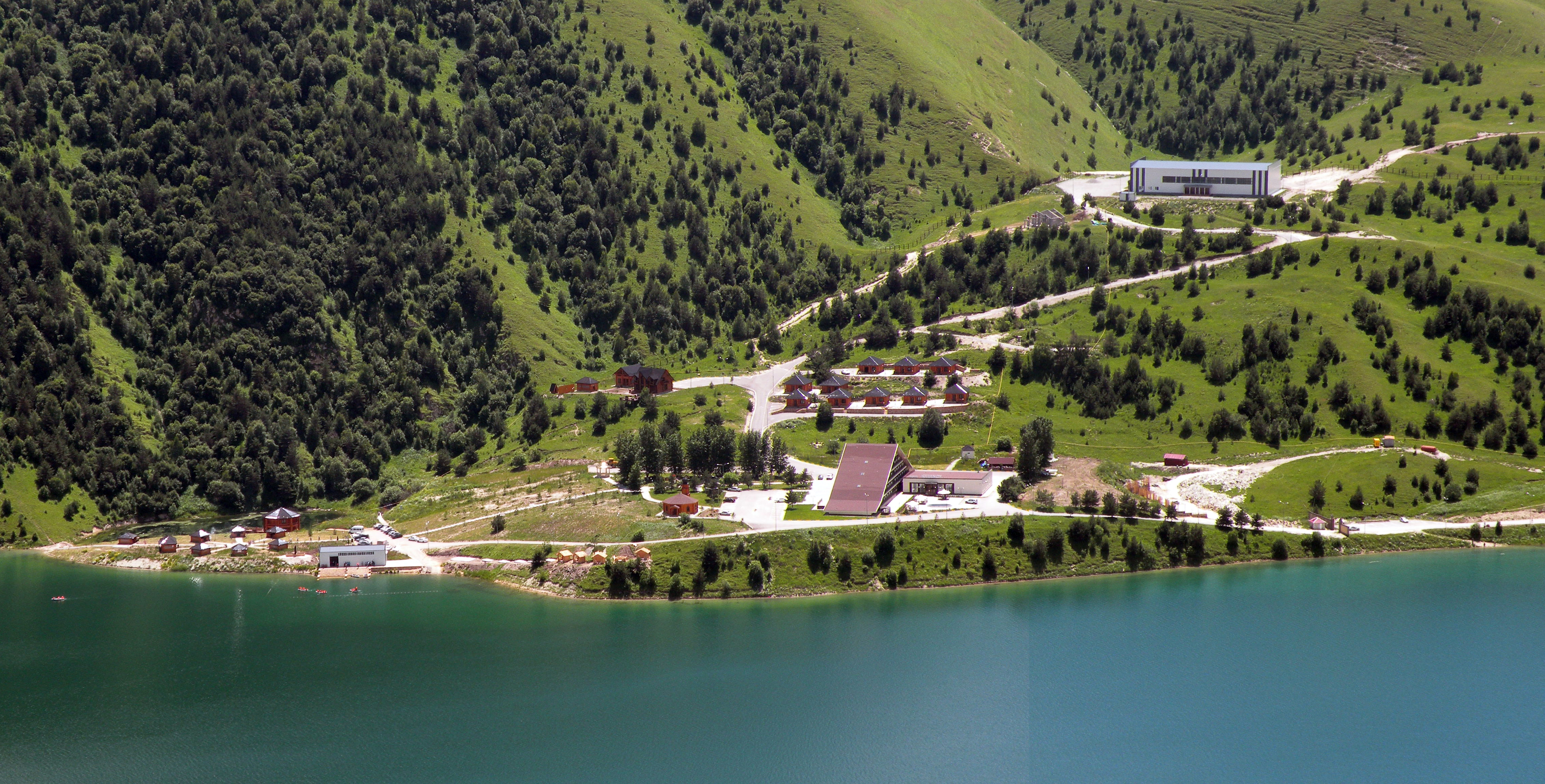 Спортивно-туристский комплекс "Кезеной-Ам", общий вид, июнь 2016 г.